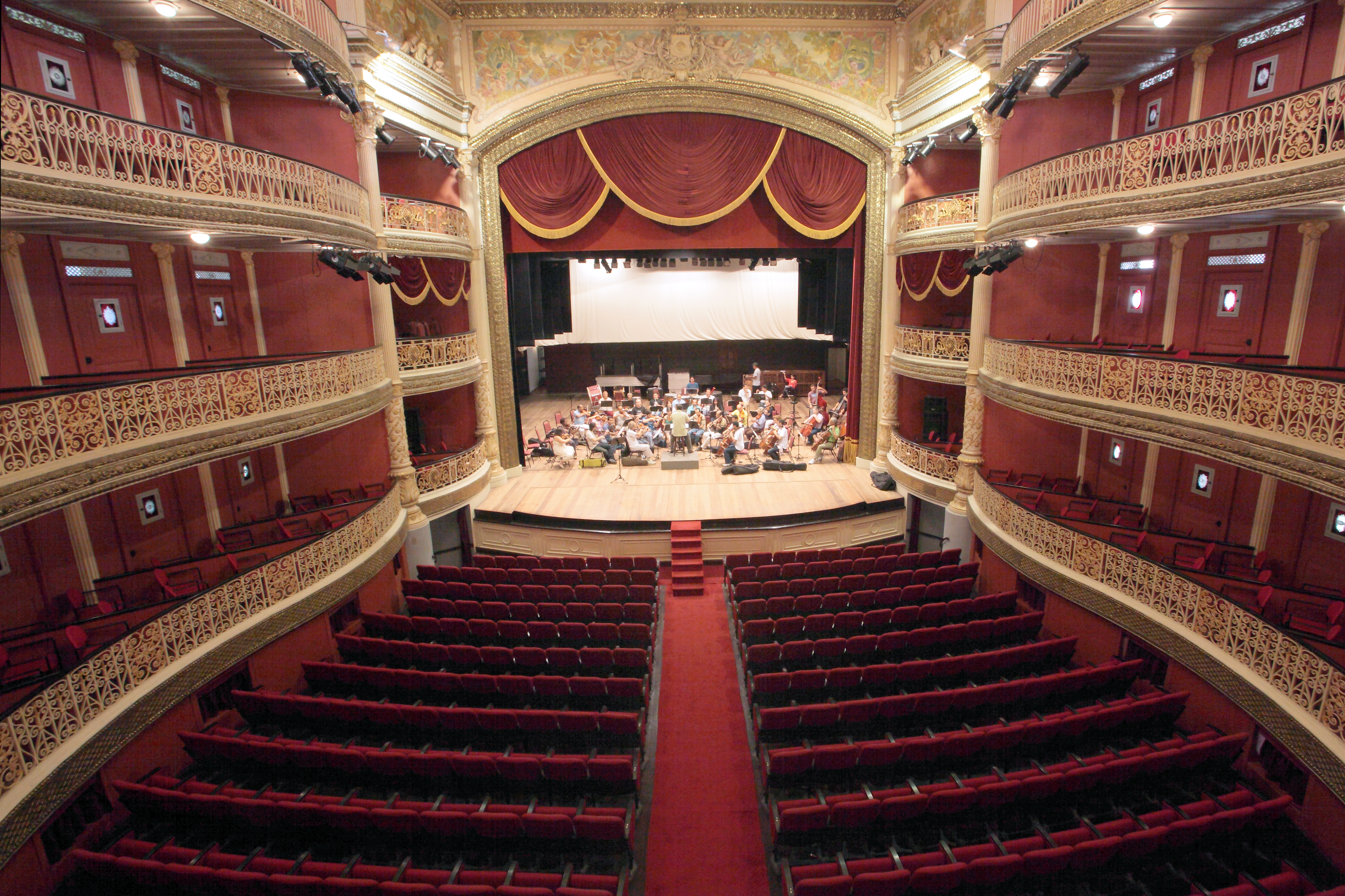 Teatro Santa Isabel